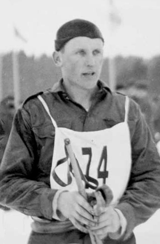 Sulo Nurmela